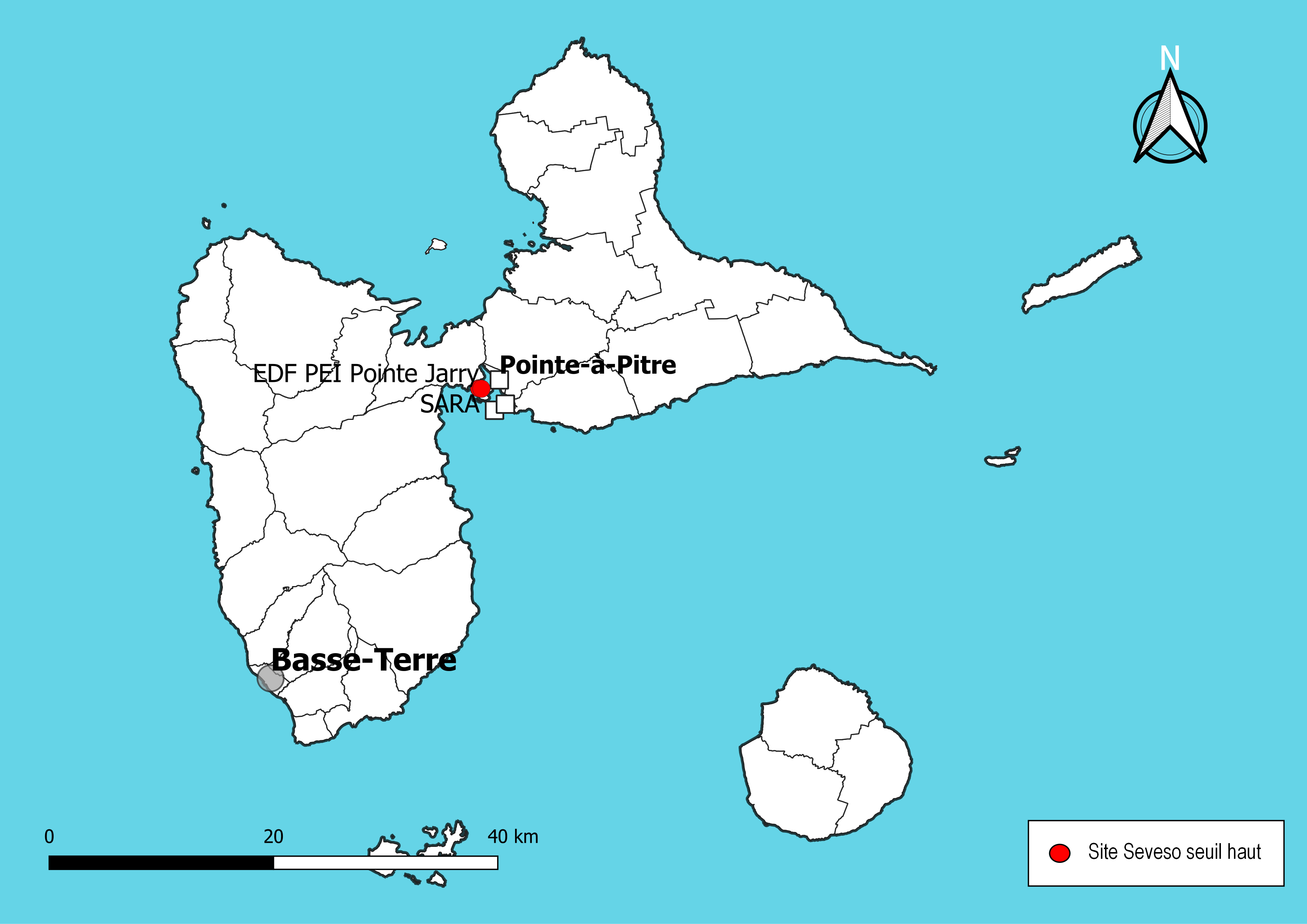 Carte de localisation des sites Seveso seuil haut en Guadeloupe (France). Carte arrêtée au 12 novembre 2019.